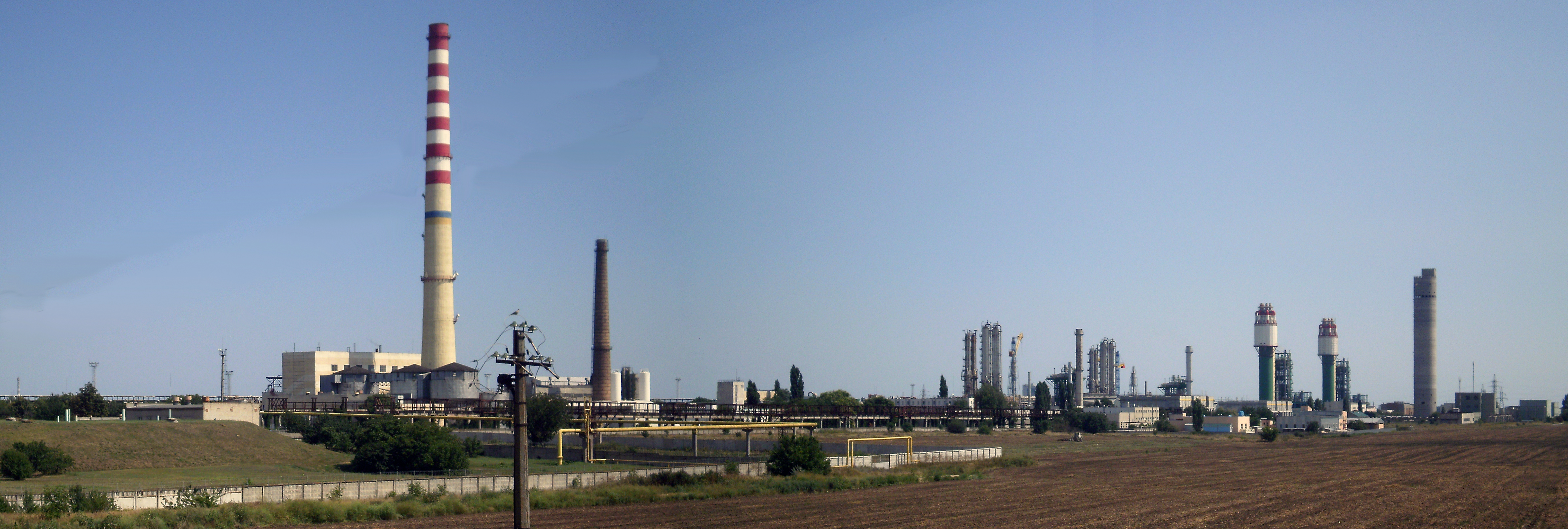 Одесский Припортовый завод